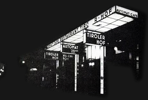 Leuchtreklame nach der Frankfurter Werbeordnung, 1928